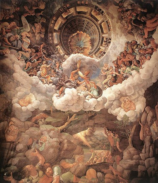 Das von Giulio Romano geschaffene Fresko im manieristischen Stil lässt den Betrachter bewusst erschaudern aus Angst, vor den Massen und den stürzenden Säulen erschlagen zu werden. Der Boden übt einen spiralförmigen Sog nach unten aus und bezieht den Betrachter förmlich in das Chaos mit ein.